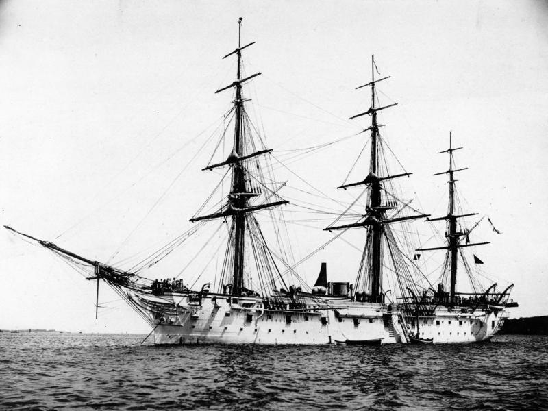 S.M.S. Stein